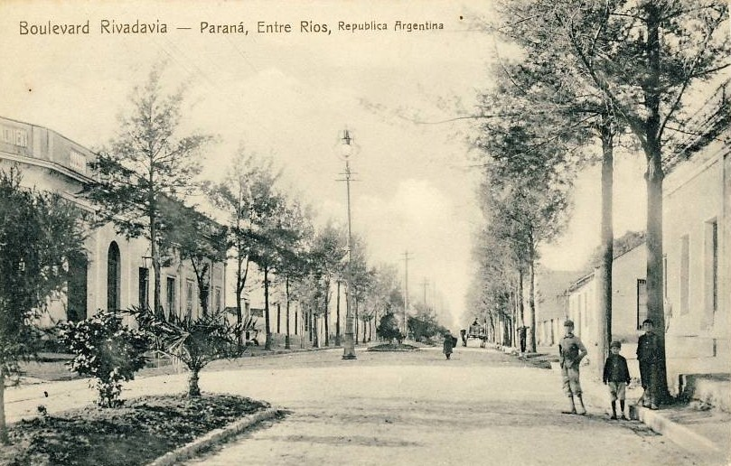 Vista del Boulevard Rivadavia en Paraná, Argentina. Hoy llamado Alameda de la Federación.